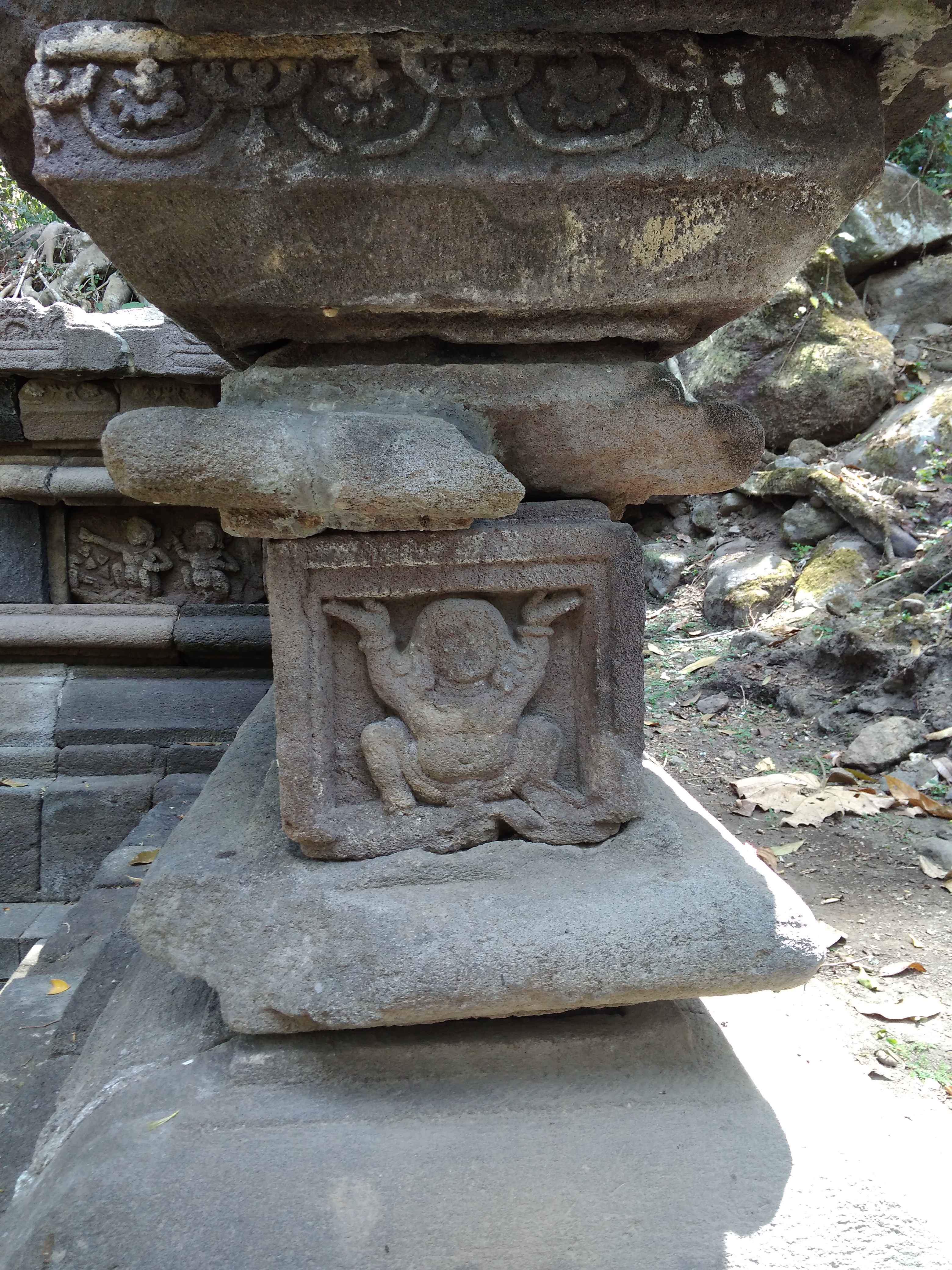 Relief (kemungkinan Gana) di Petirtaan Cabean Kunti